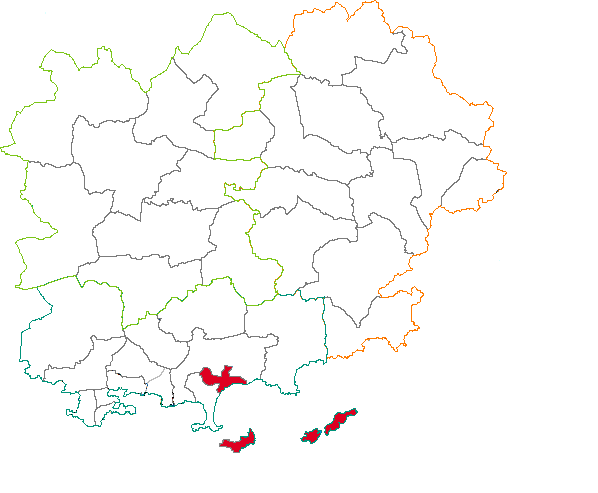 Situation du canton dans le département du Var (83), France